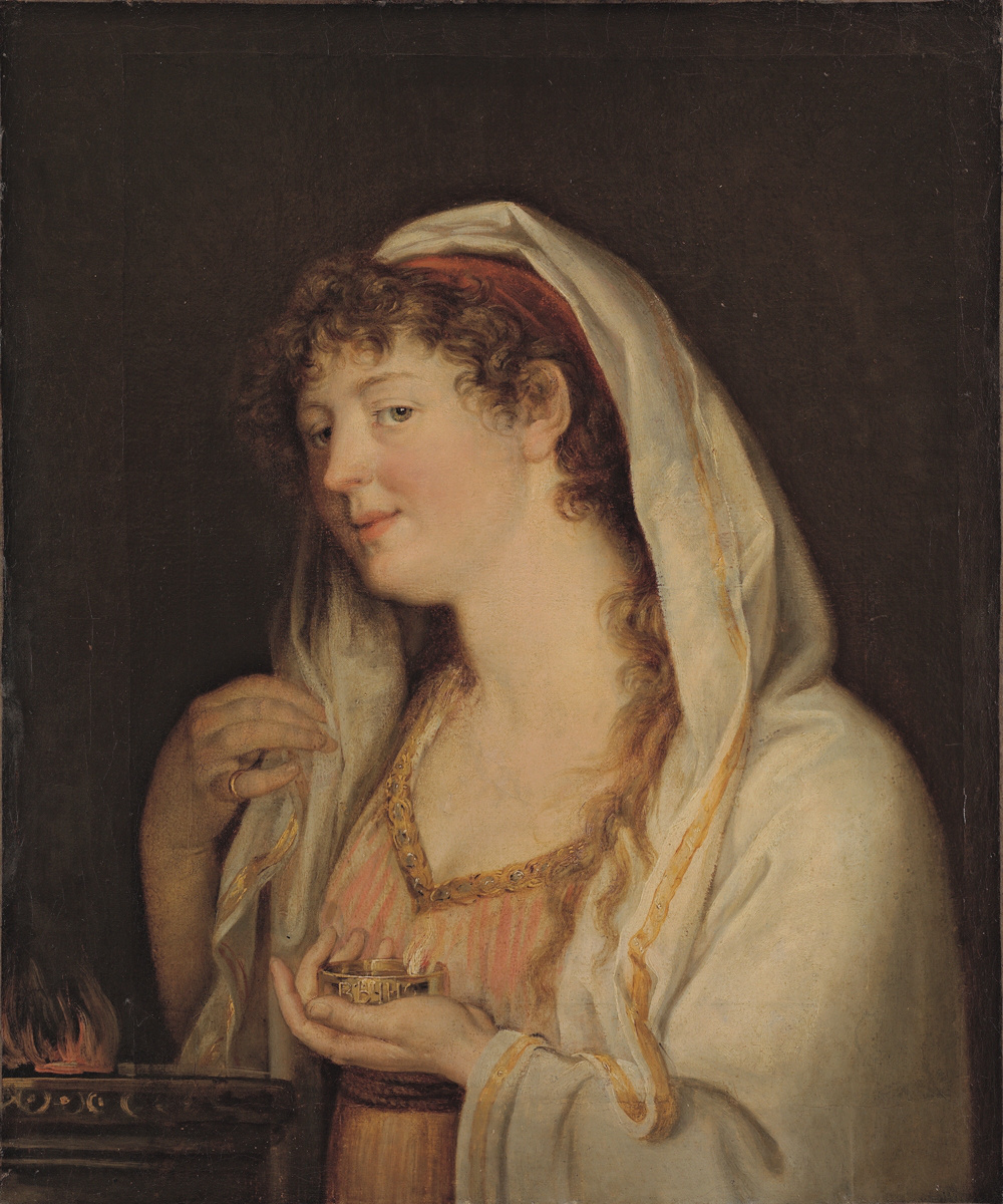 Portrait of Yekaterina Ivanovna Ivanova (1782 — 1842)